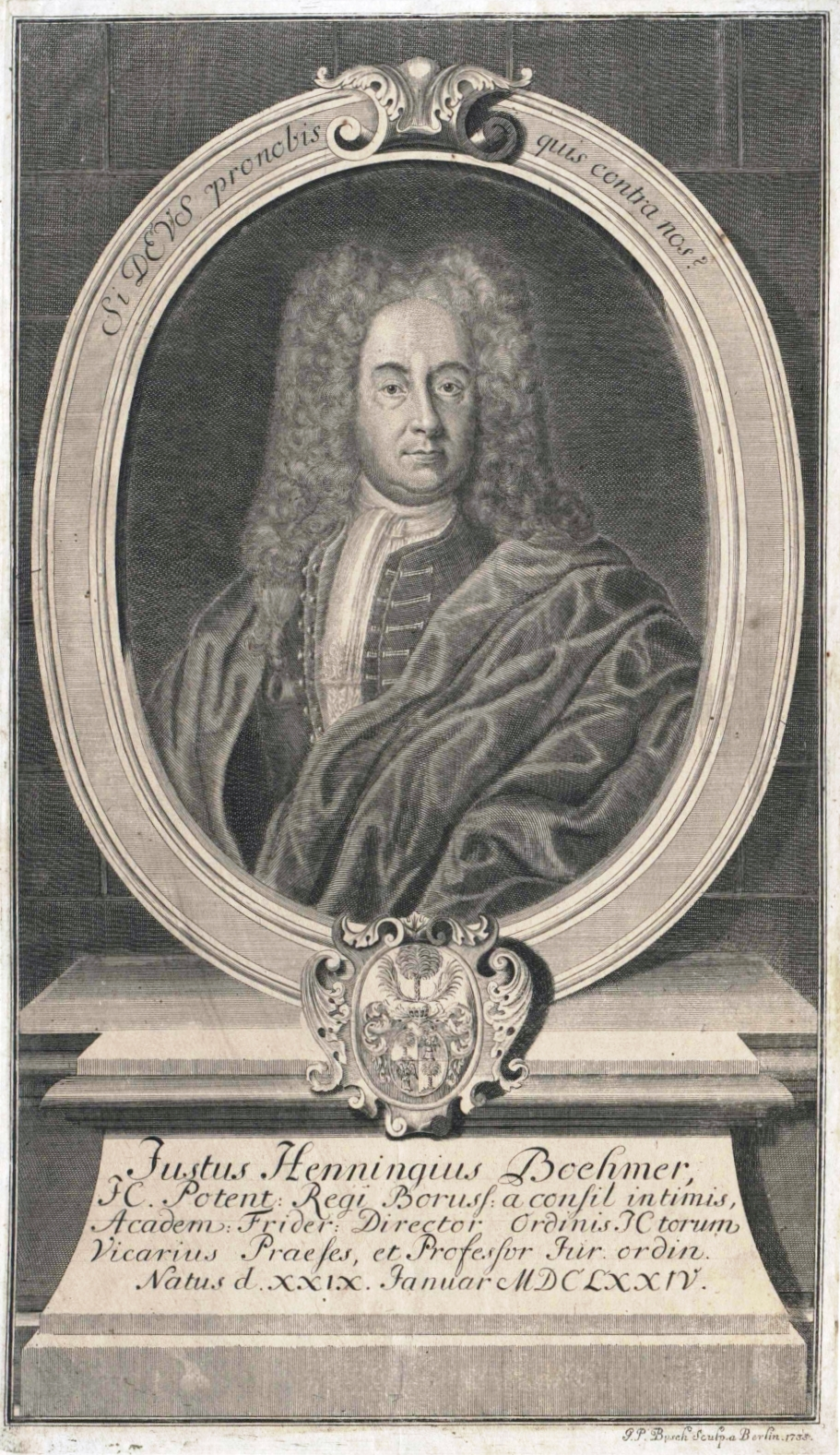 Portrait Justus Henning Boehmer